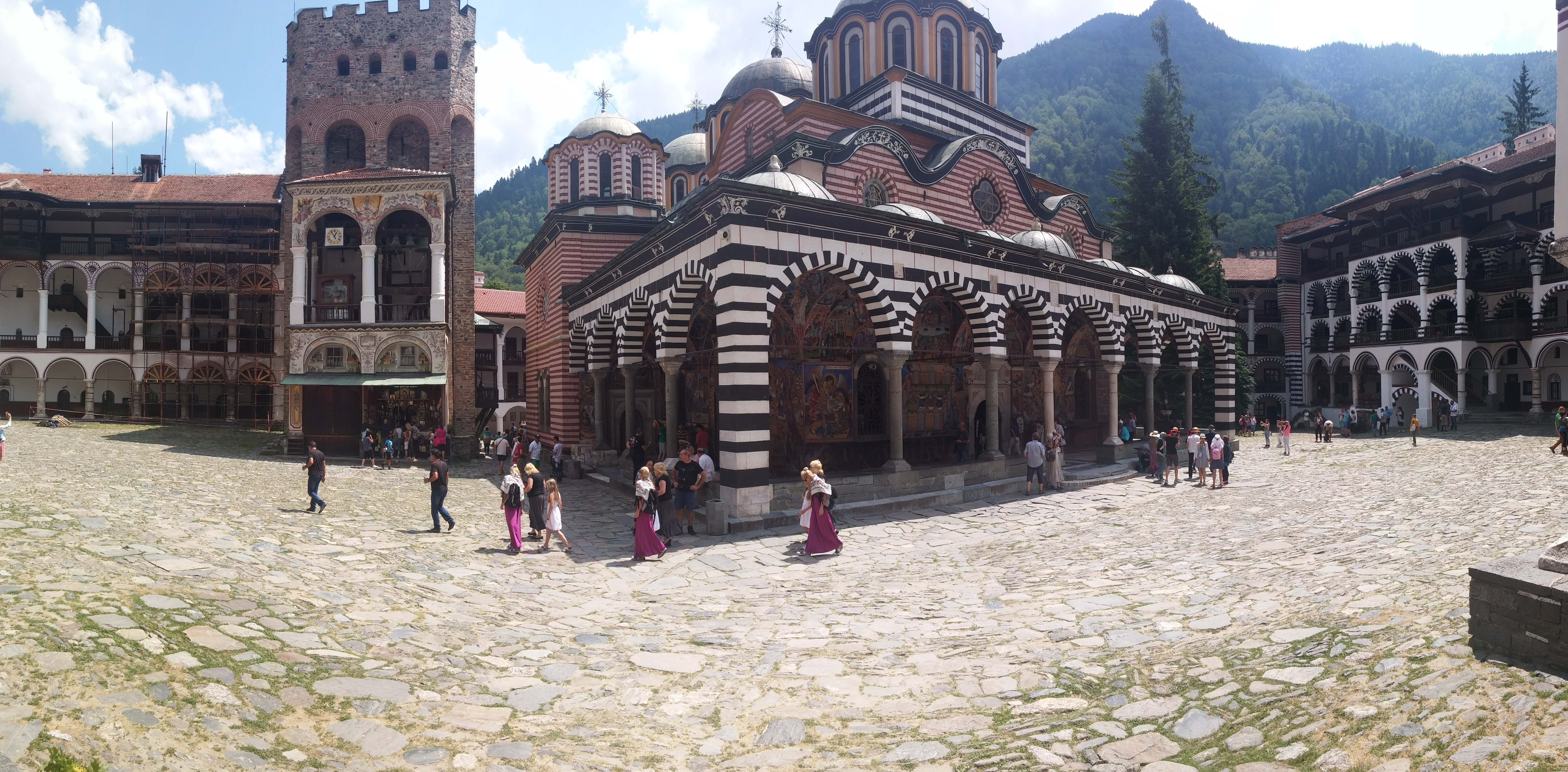 Вътрешната част на Рилския манастир